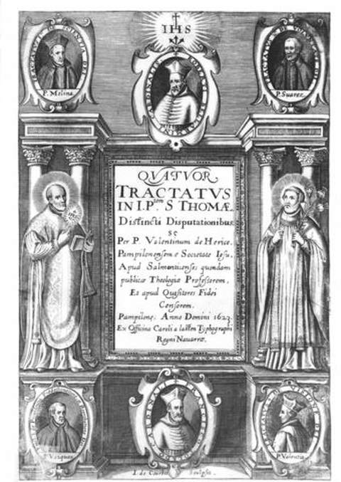 Quatuor tractatus, Santo Tomás de Aquino, Pamplona, Carlos Labayen, 1615